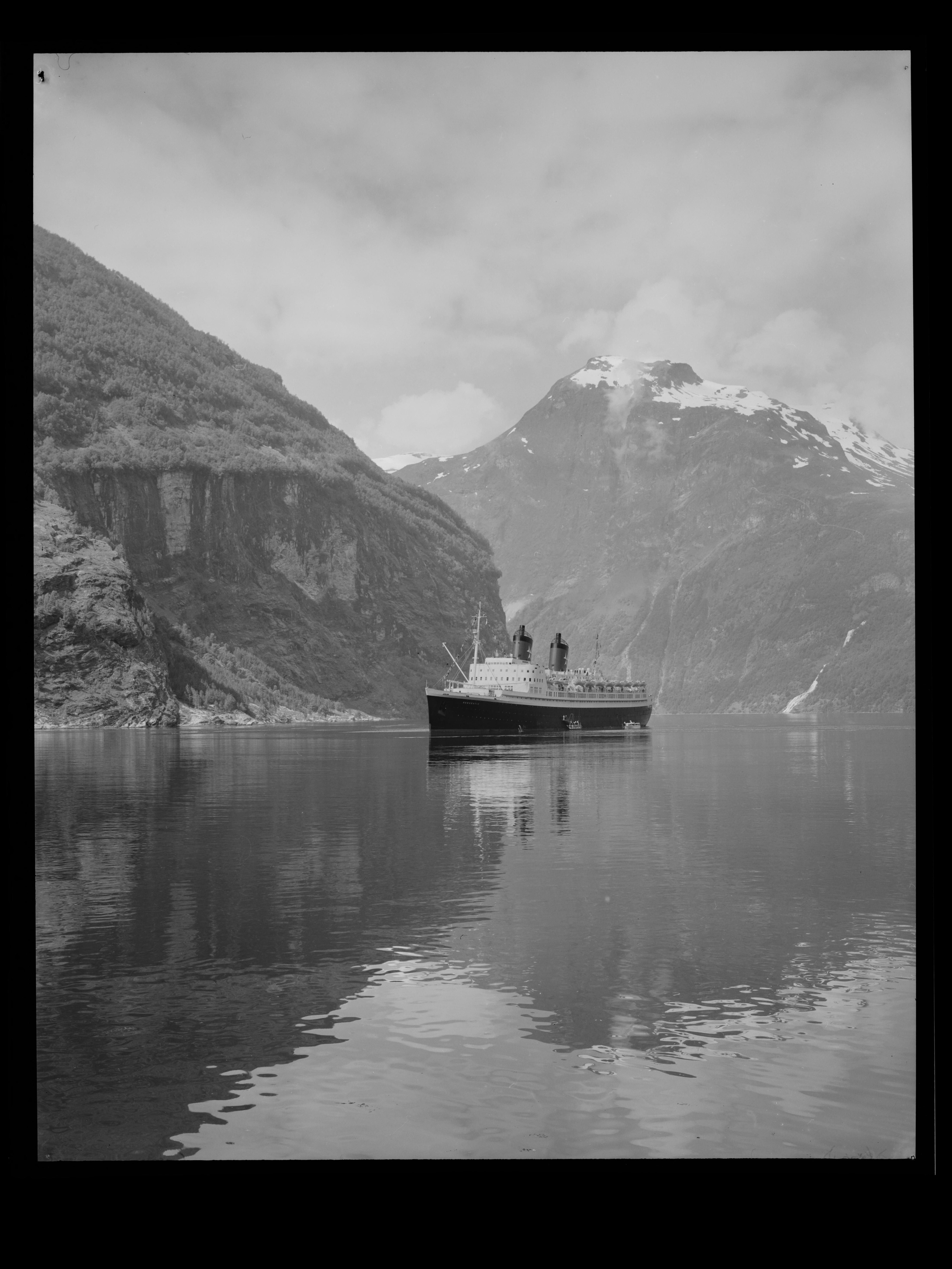 Bildet er hentet fra Nasjonalbibliotekets bildesamling. Anmerkninger til bildet var: fotograf: Å.M. Geirangerfjorden, Stranda, Møre og Romsdal